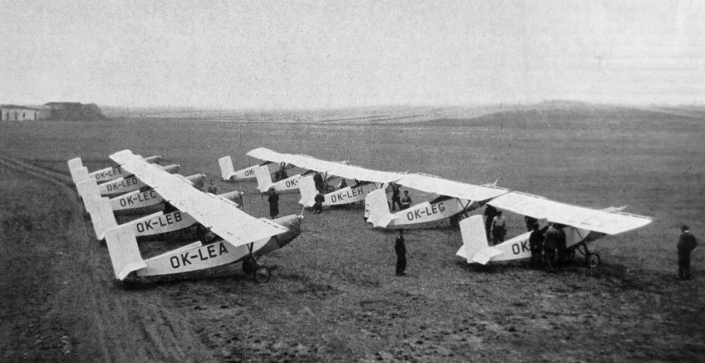 letecký motor Walter Minor 4 a letadla Letov Š-239 (1934)